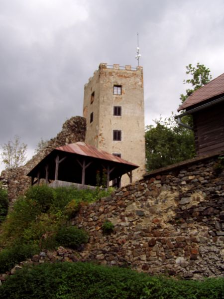 Rozhledna hradu Rýzmberk, přístupná veřejnosti.